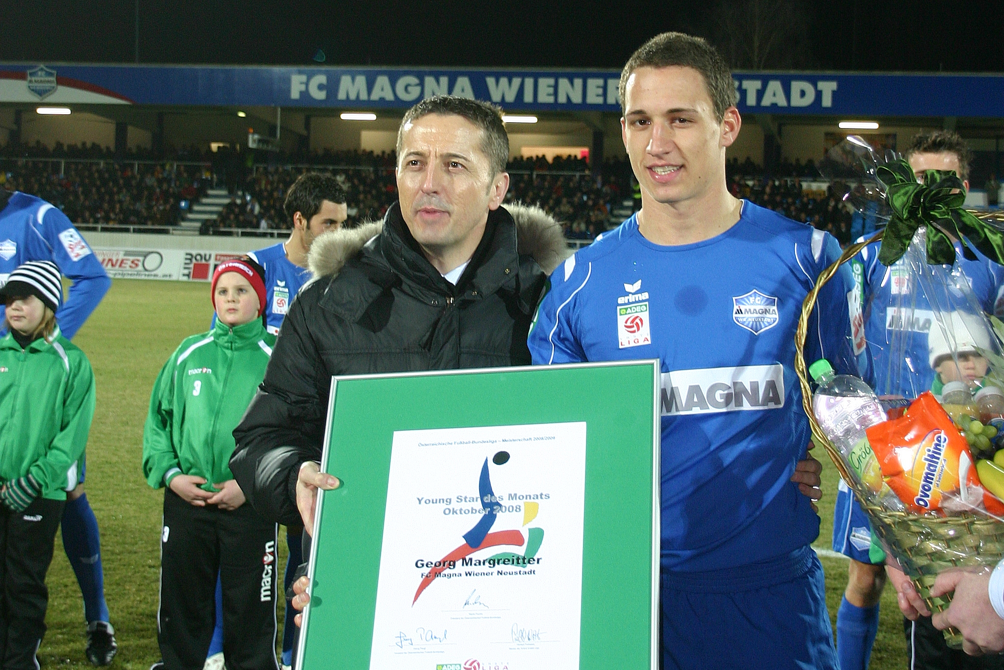 Georg Margreitter (FC Magna Wiener Neustadt) Ehrung als Young Star Oktober 2008 durch den Vorstand der österreichischen Bundesliga Georg Pangl